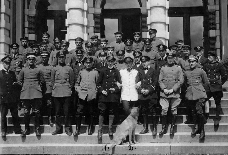 Theo Osterkamp mit Kameraden Leutnant d. R. [Theodor] Osterkamp (1) und Leutnant z. S. [Gotthard] Sachsenberg (2). Der 500. Ritter des Ordens Pour le Mérite, mit seinen Kameraden Abgebildete Personen: Osterkamp, Theodor: Generalmajor, Ritterkreuz (RK), Luftwaffe, Orden Pour le mérite, Deutschland (GND 124745822) Sachsenberg, Gotthard: Leutnant, Luftwaffe, Orden Pour le mérite, Deutschland